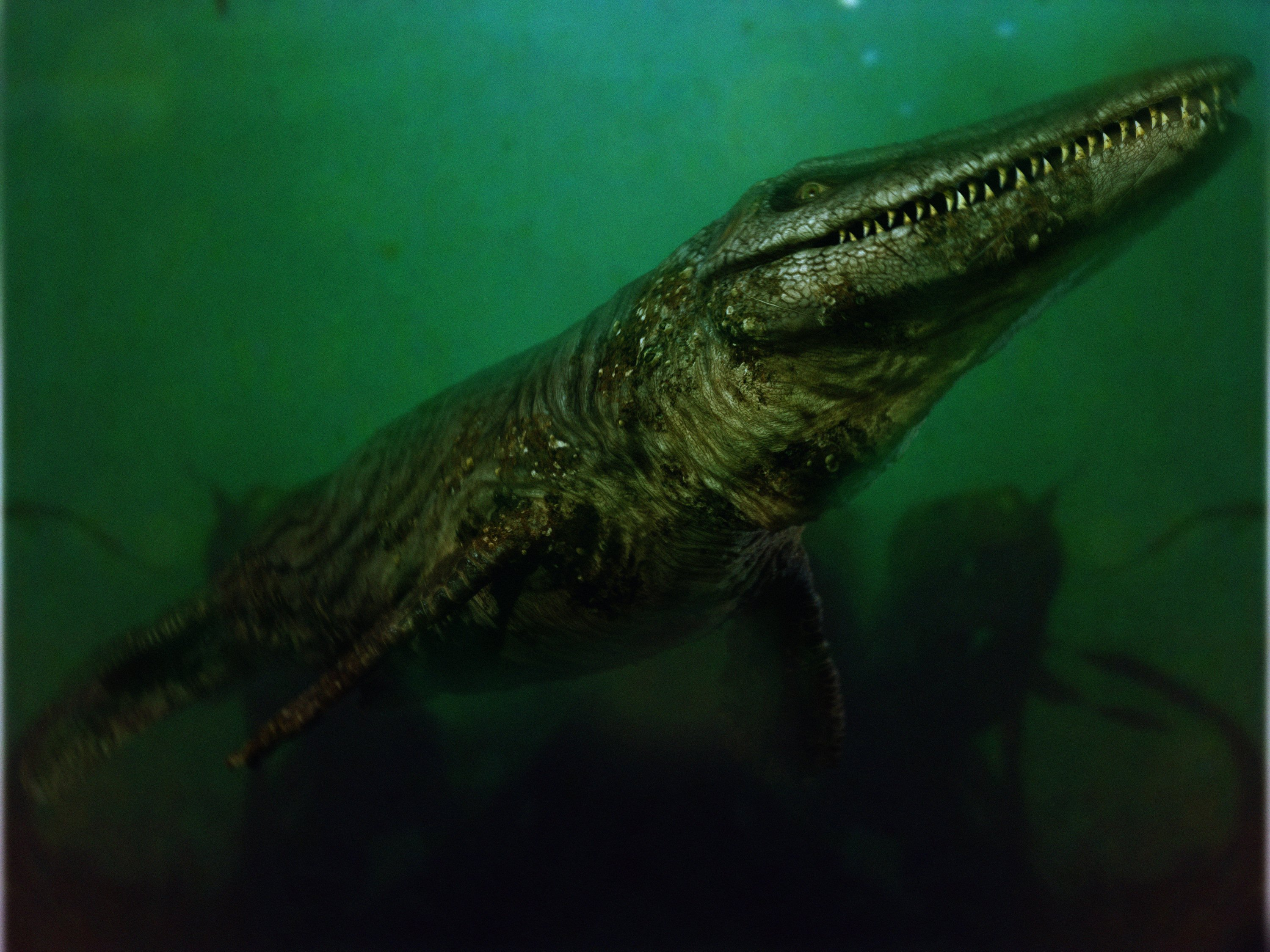 Tylosaur